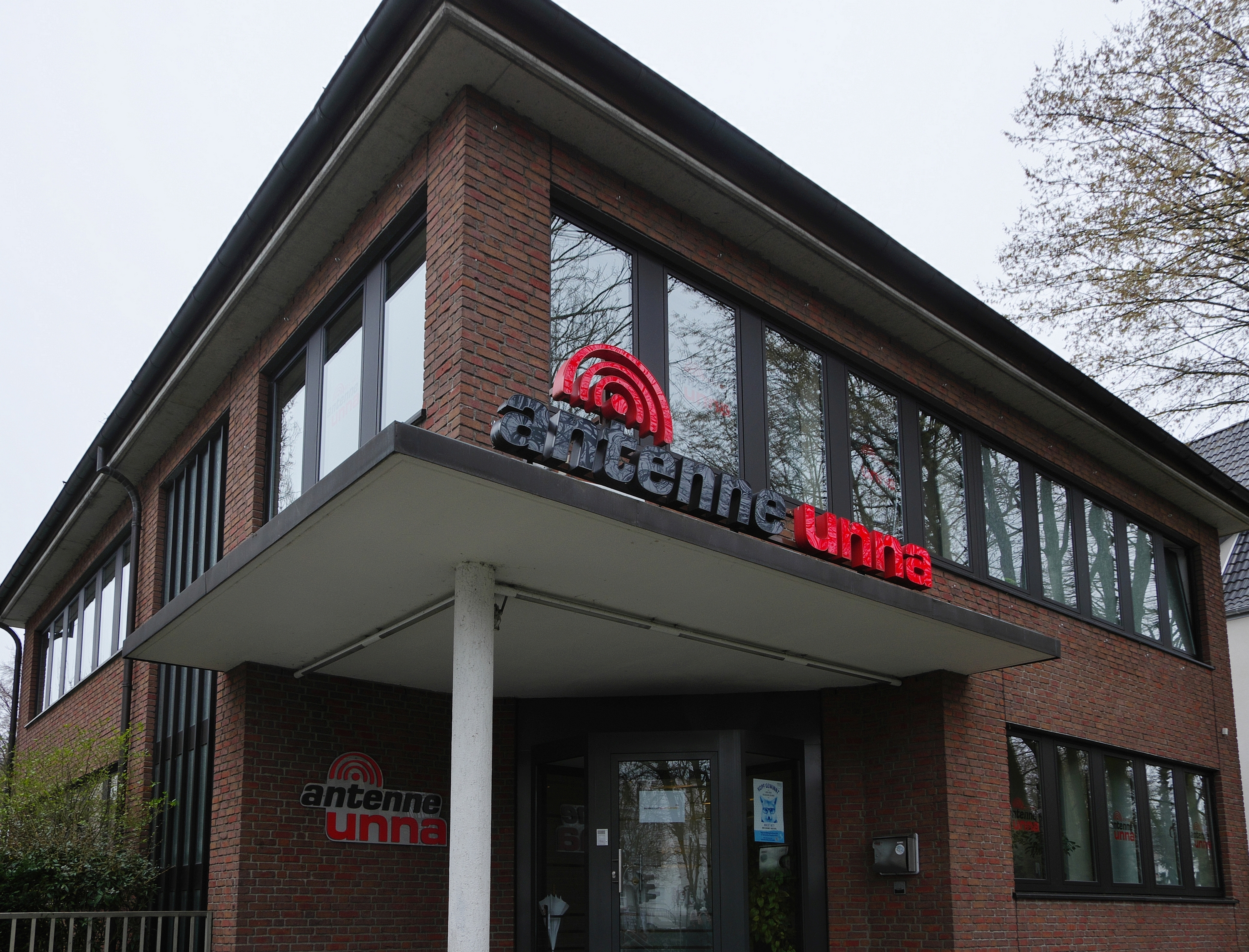 Sitz des Lokalsenders Antenne Unna am Ostring